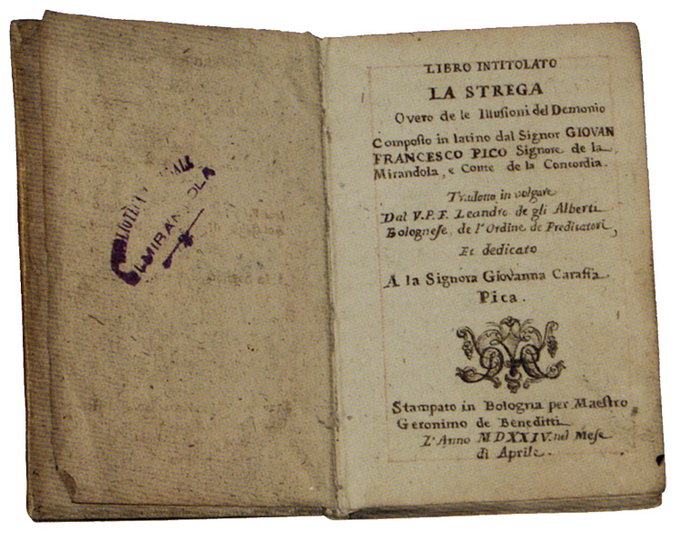 Tradotto in volgare dal V.P.F. Leandro de gli Alberti, Bolognese de l'Ordine de Predicatori, et dedicato a la Signora Giovanna Caraffa Pica Stampato in Bologna per Maestro Geronimo de Beneditti L'anno MDXXIV nel mese di Aprile